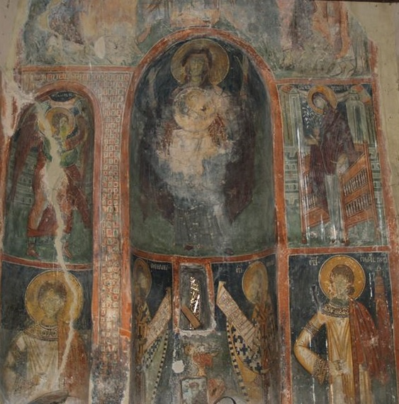 Фреска во црквата „Св. Никола“ во светиниколското село Буриловци